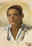 Noi argelí (1888)